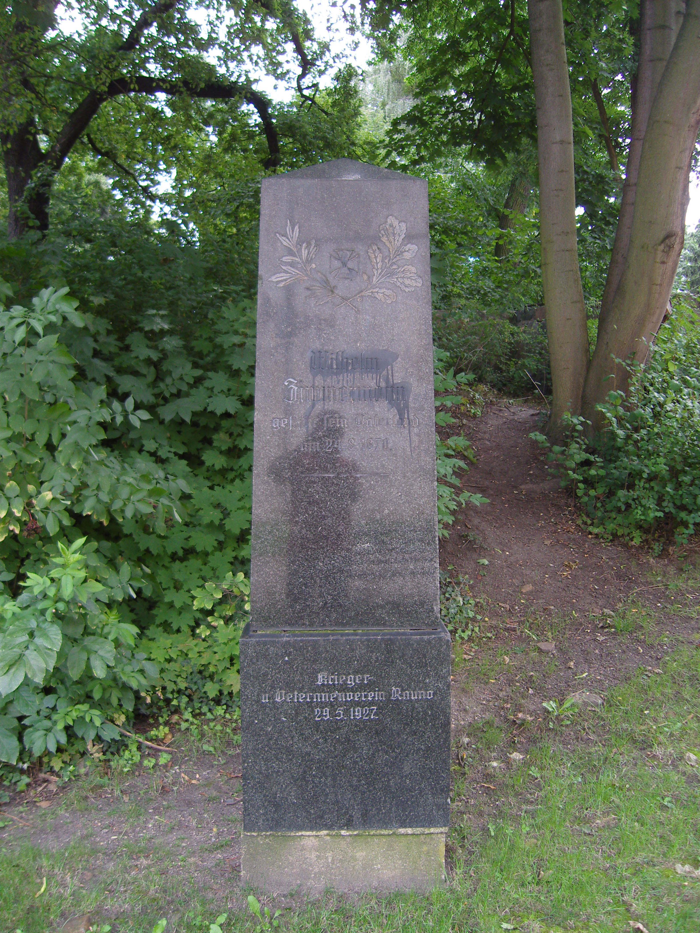 Kriegerdenkmal für Wilhelm Zimmermann; ursprünglich am 22. März 1889 in Rauno aufgestellt; wegen Devastierung des Orts am 16. November 1926 abgebaut; am 29. Mai 1927 in den Innenhof der Festungsanlage Senftenberg umgesetzt durch den Krieger- und Veteranenverein Rauno